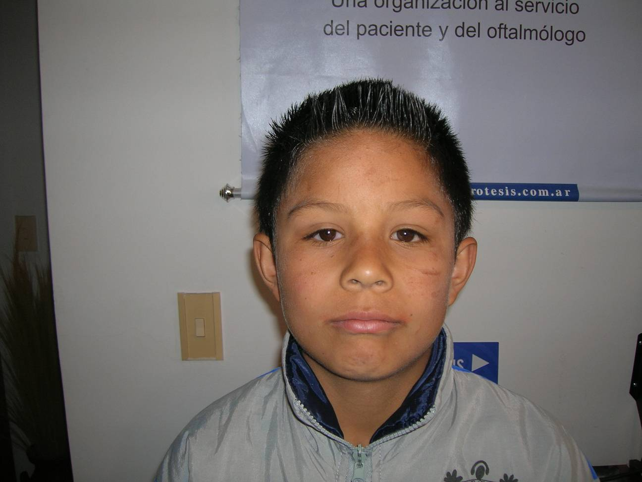 Este niño tuvo un RTB (retinoblastoma cancer en la retina)y se le extirpó el globo ocular. Luego se le colocó una prótesis ocular